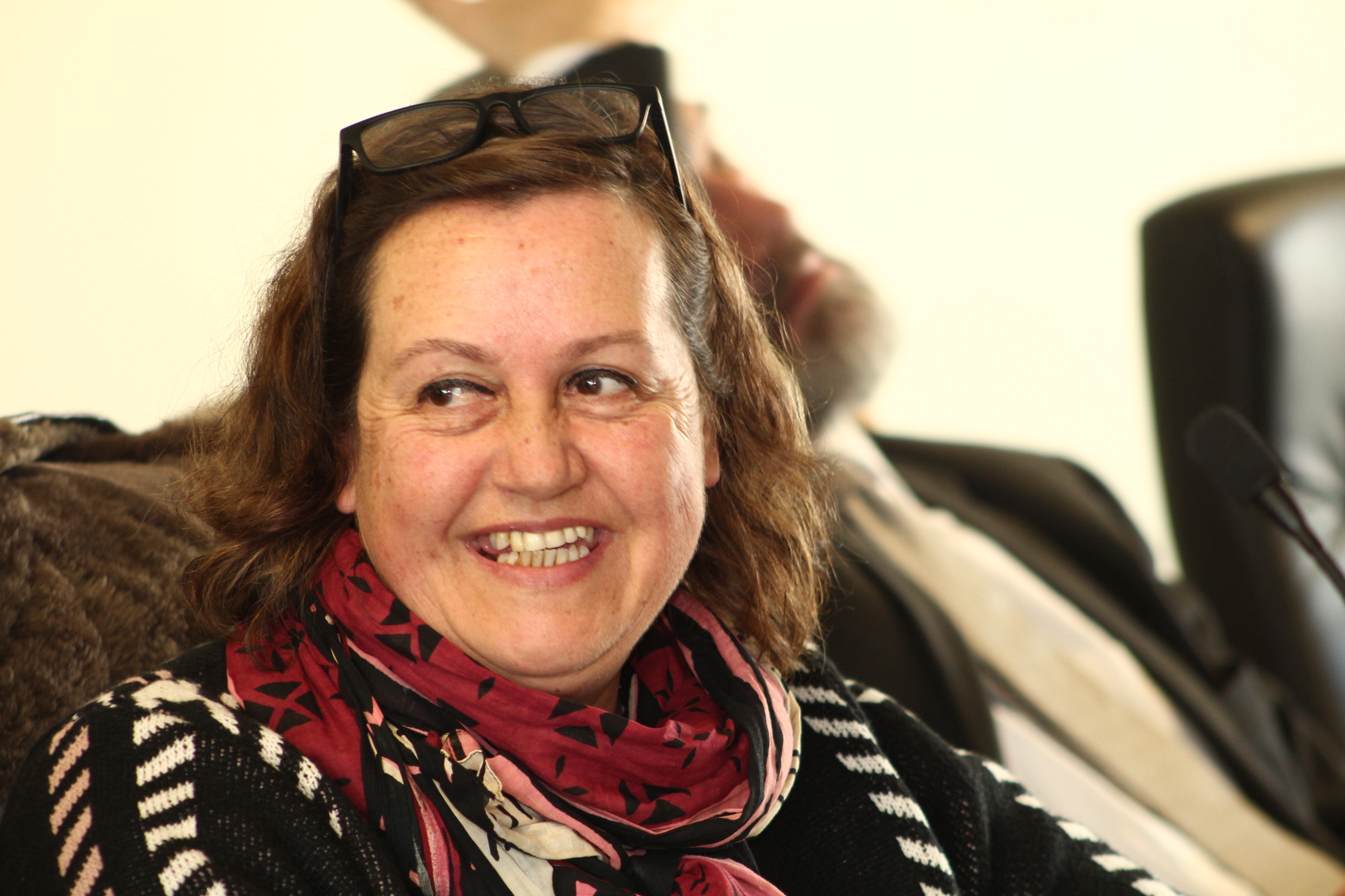 Foto de la ex autoridad regional de la Región de la Araucanía